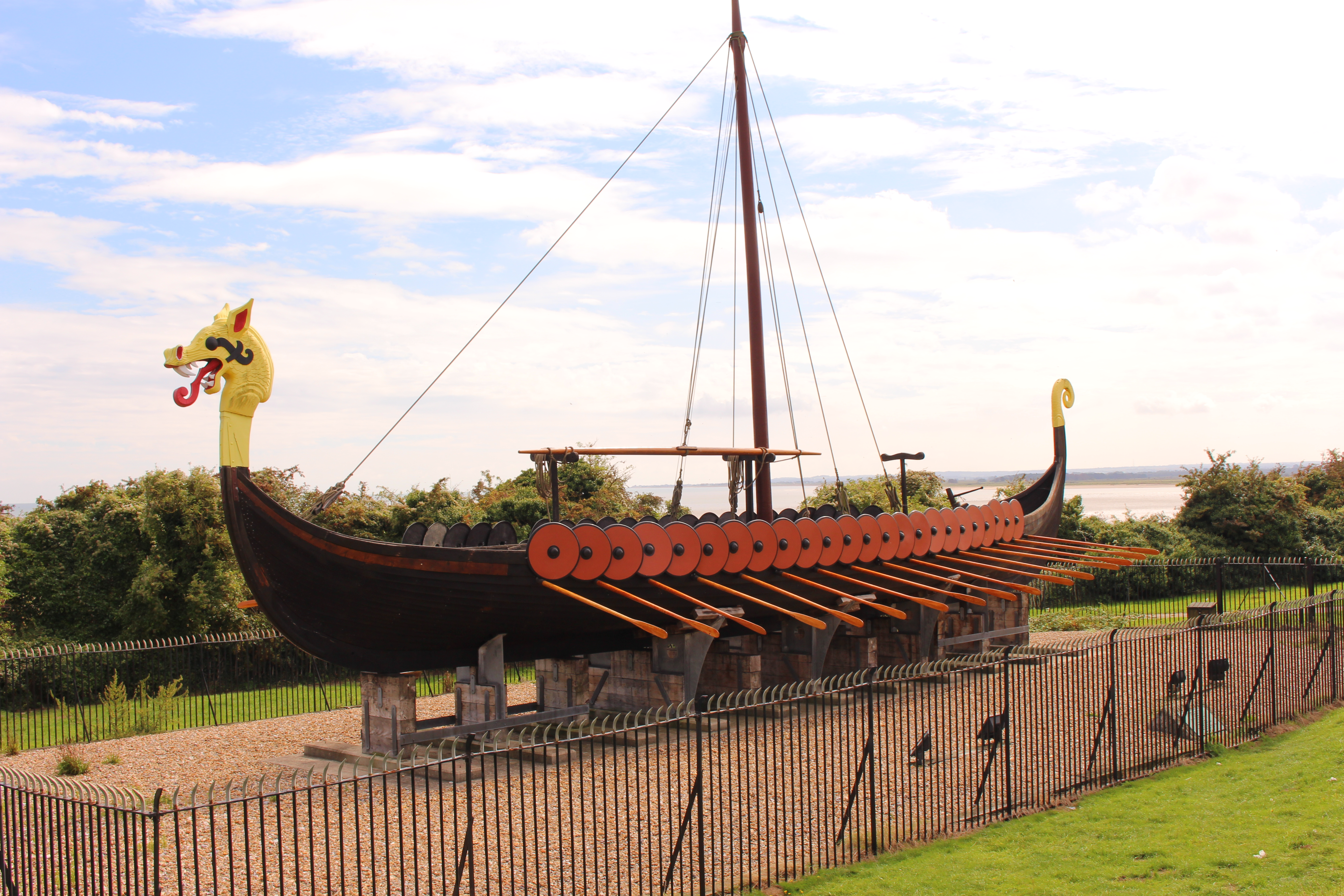 Ein altes Wikinger Schiff an der Küste von Cliffs End.